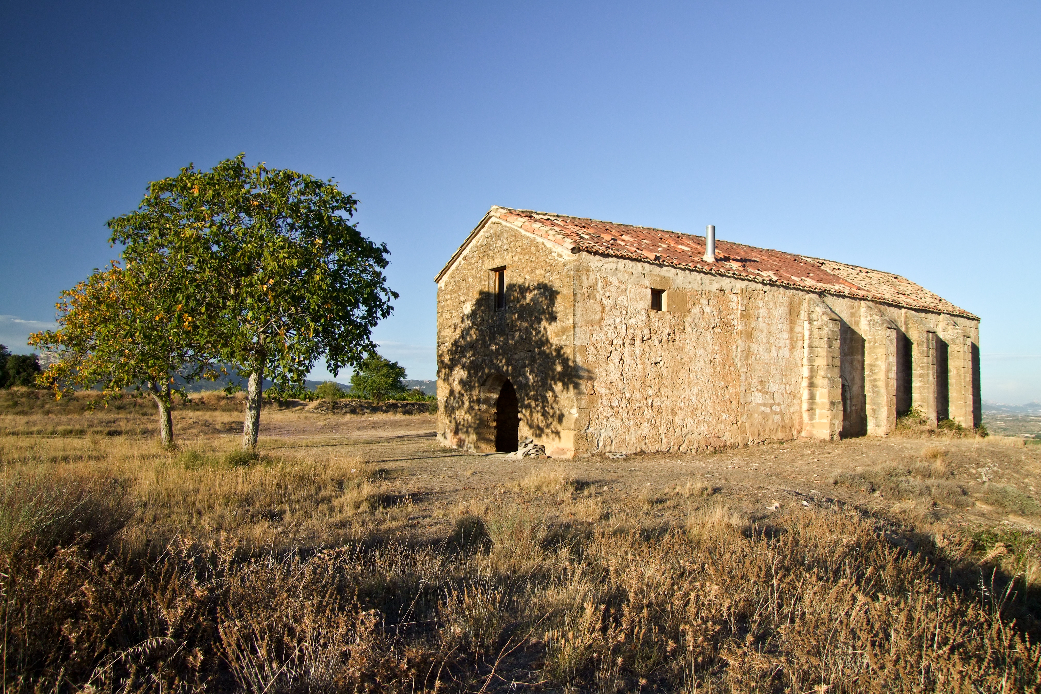 Ermita de los Santos Mártires en la localidad de Briones, La Rioja - España